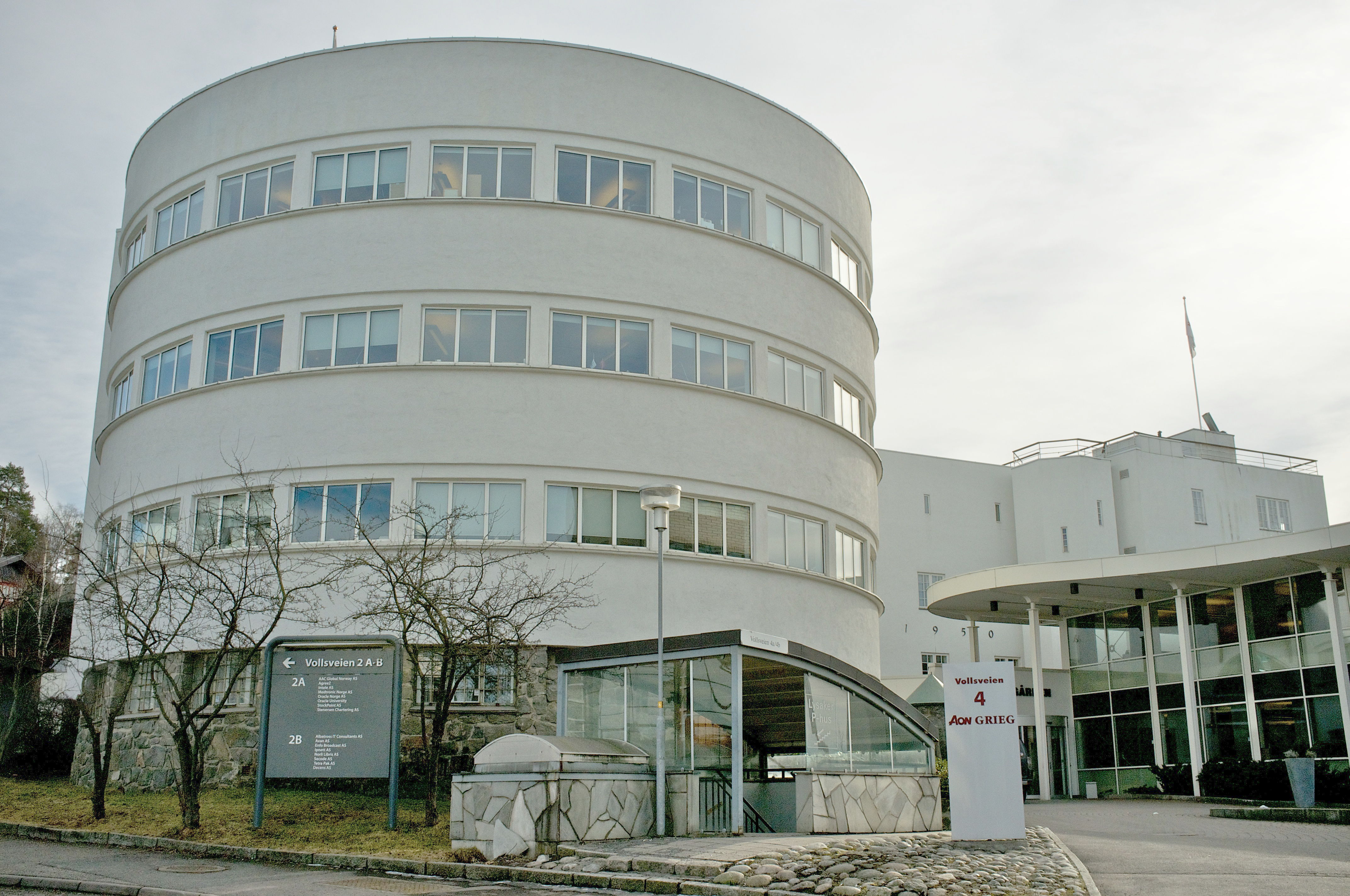 "Klavenessbygget", Vollsveien 4 på Lysaker